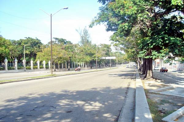 Una foto de la Quinta de los Molinos